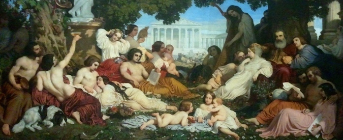 detail